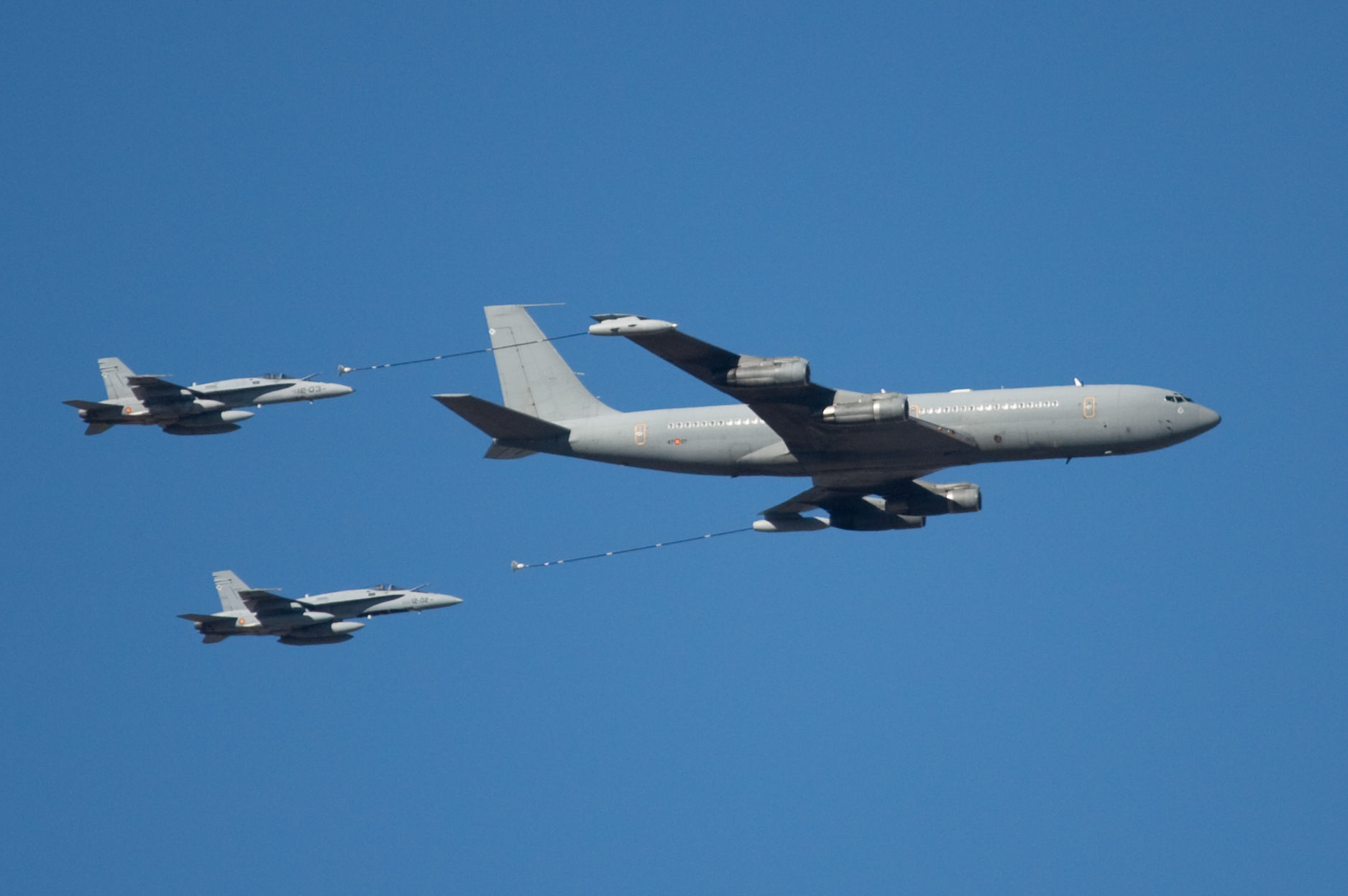 Dos McDonnell Douglas F/A-18A Hornet repostando en el aire desde un Boeing 707-331B(KC) Madrid 12 de octubre de 2009 - Día de la Hispanidad Desfile aéreo